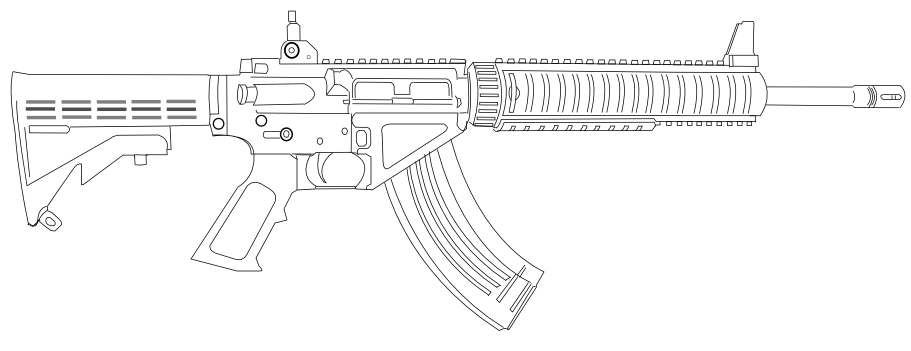 KAC SR-47